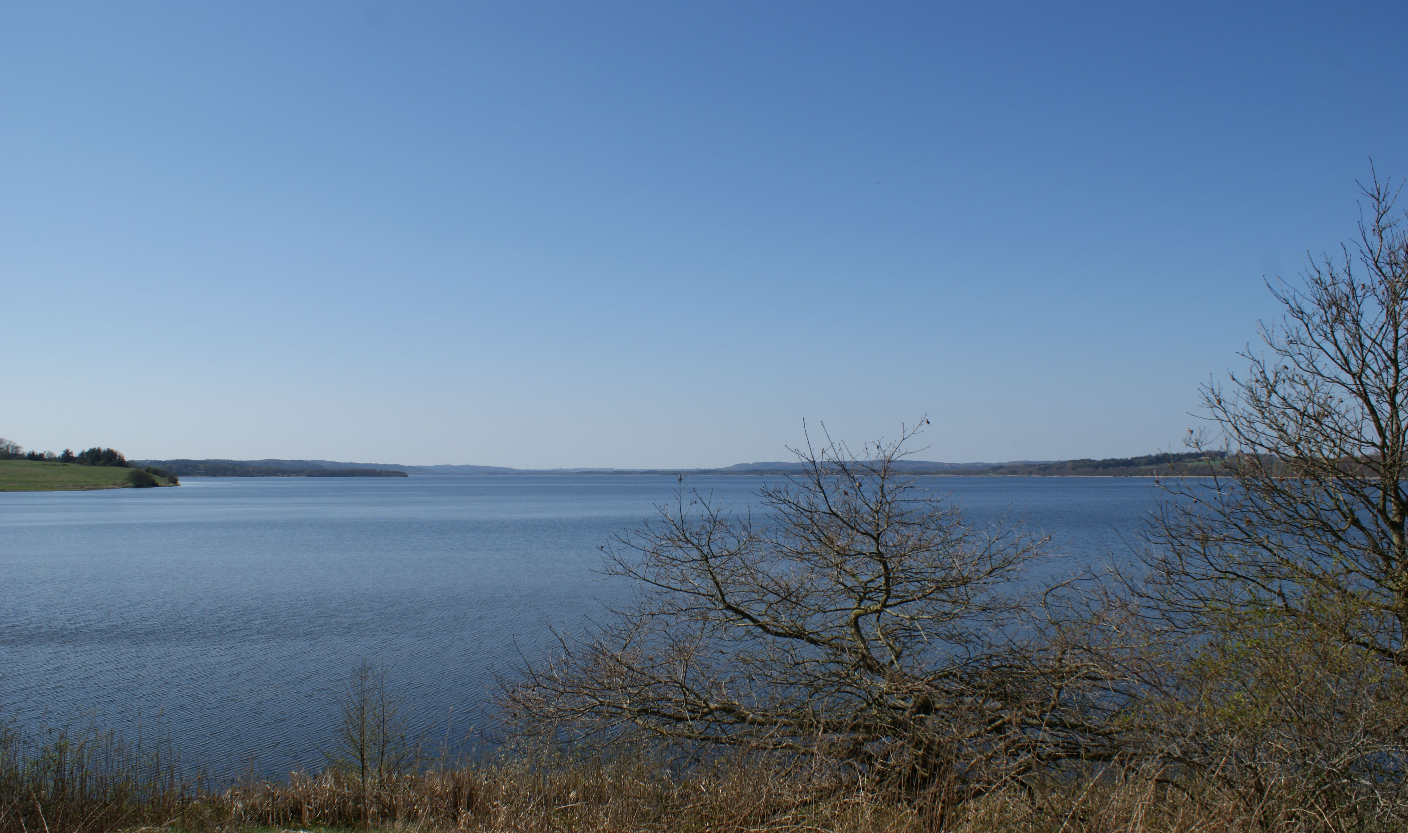 Mossø